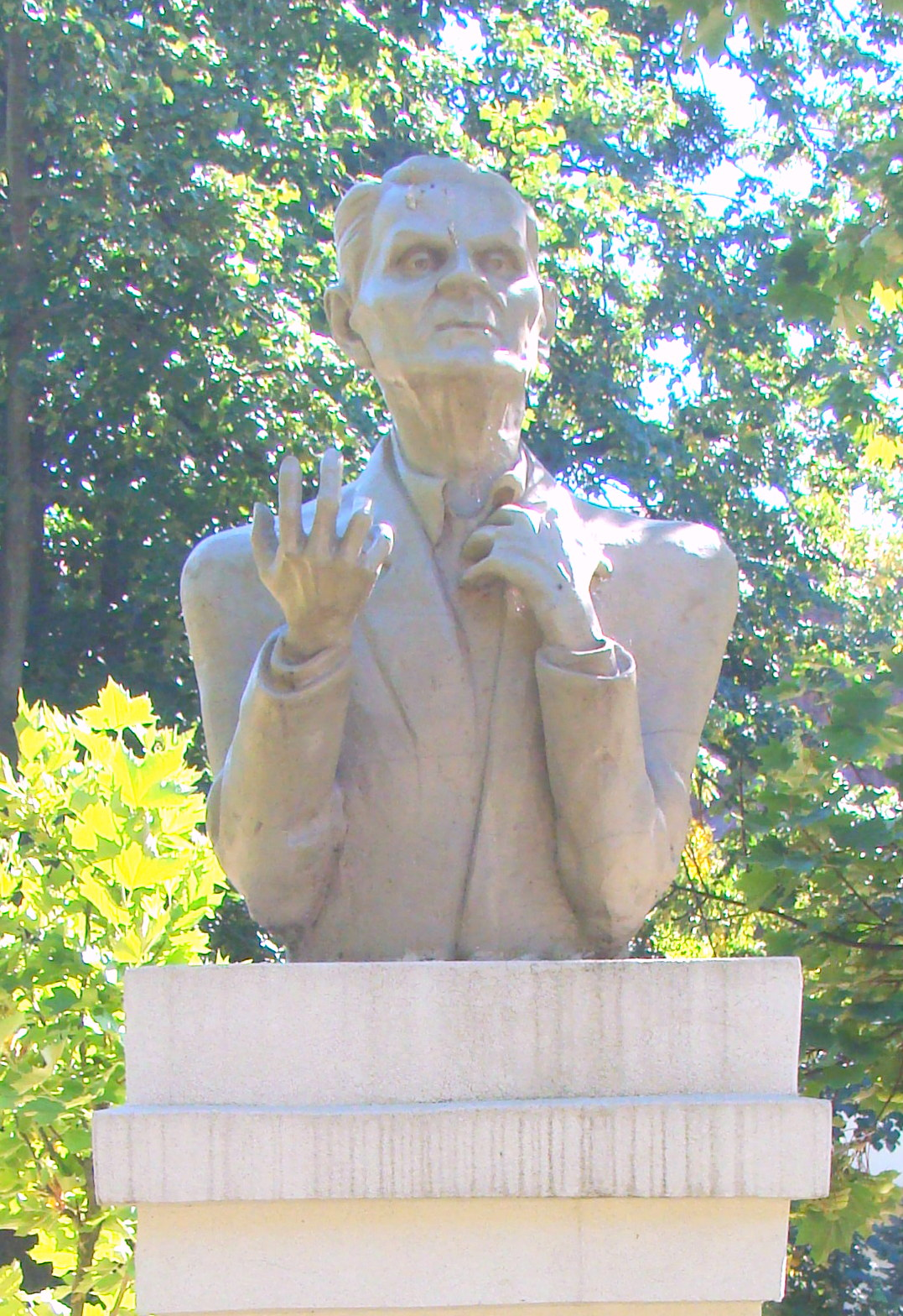 Bustul lui Corneliu Coposu din Șimleu Silvaniei